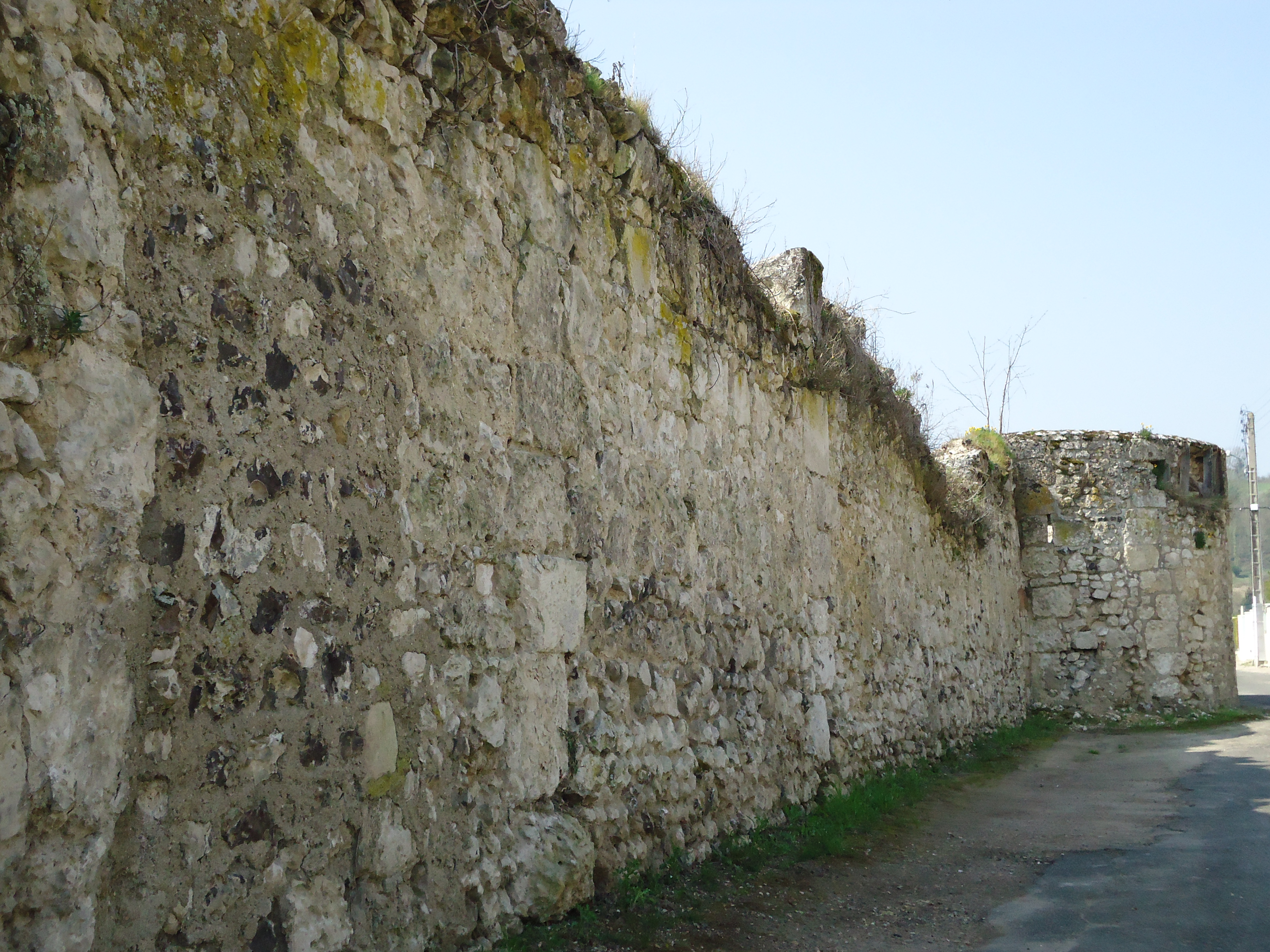 Remparts nord du Grand-Andely - XIIème siècle. Rue des Remparts, Les Andelys.